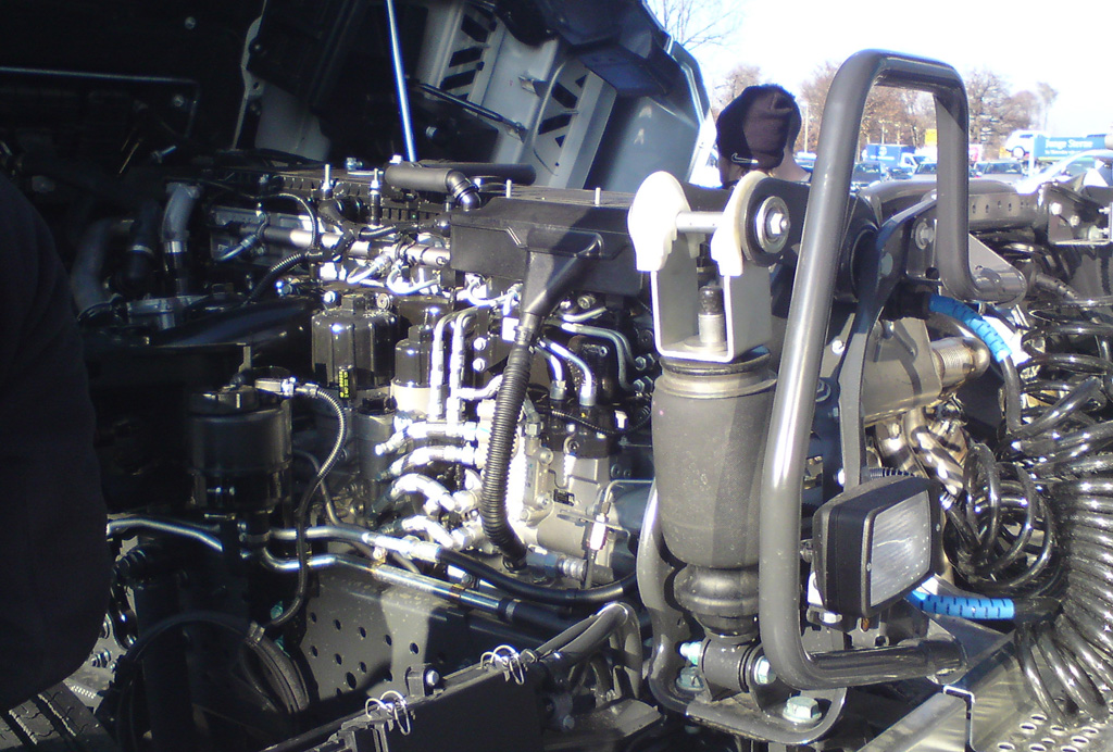 Seitlicher Blick auf den neuen Reihensechszylinder der Baureihe Mercedes-Benz OM 47x, eingebaut in der zweiten Generation des Mercedes-Benz Actros, Modell 1845 BlueEfficiency Power. Die maximale Leistung des Common-Rail-Dieselmotors liegt bei 330 kW (449 PS) und 2.300 Nm Drehmoment.